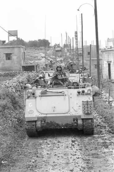 מבצע ליטני (15/3-21/3 1978). טור נגמ"שים M113 בתנועה בשטח הררי בדרום לבנון. ברקע כפר לבנוני.